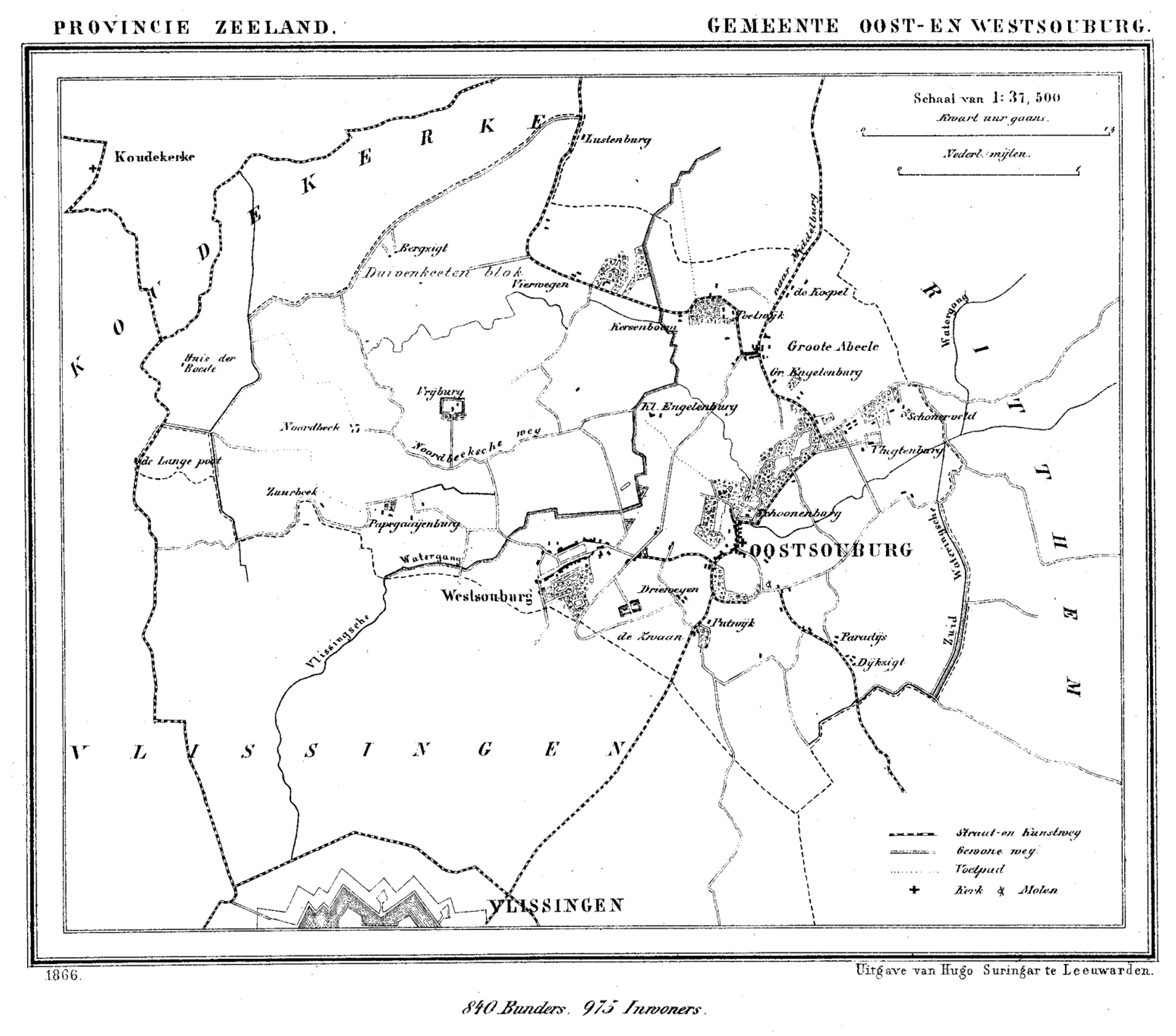 Gemeente Oost-Souburg, Zeeland, Nederland